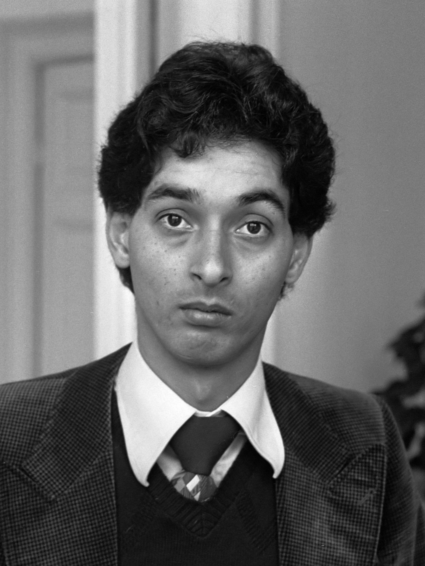 Haagse advocaat mr. G. Spong , verdediger van RAF-lid Wackernagel 17 november 1977